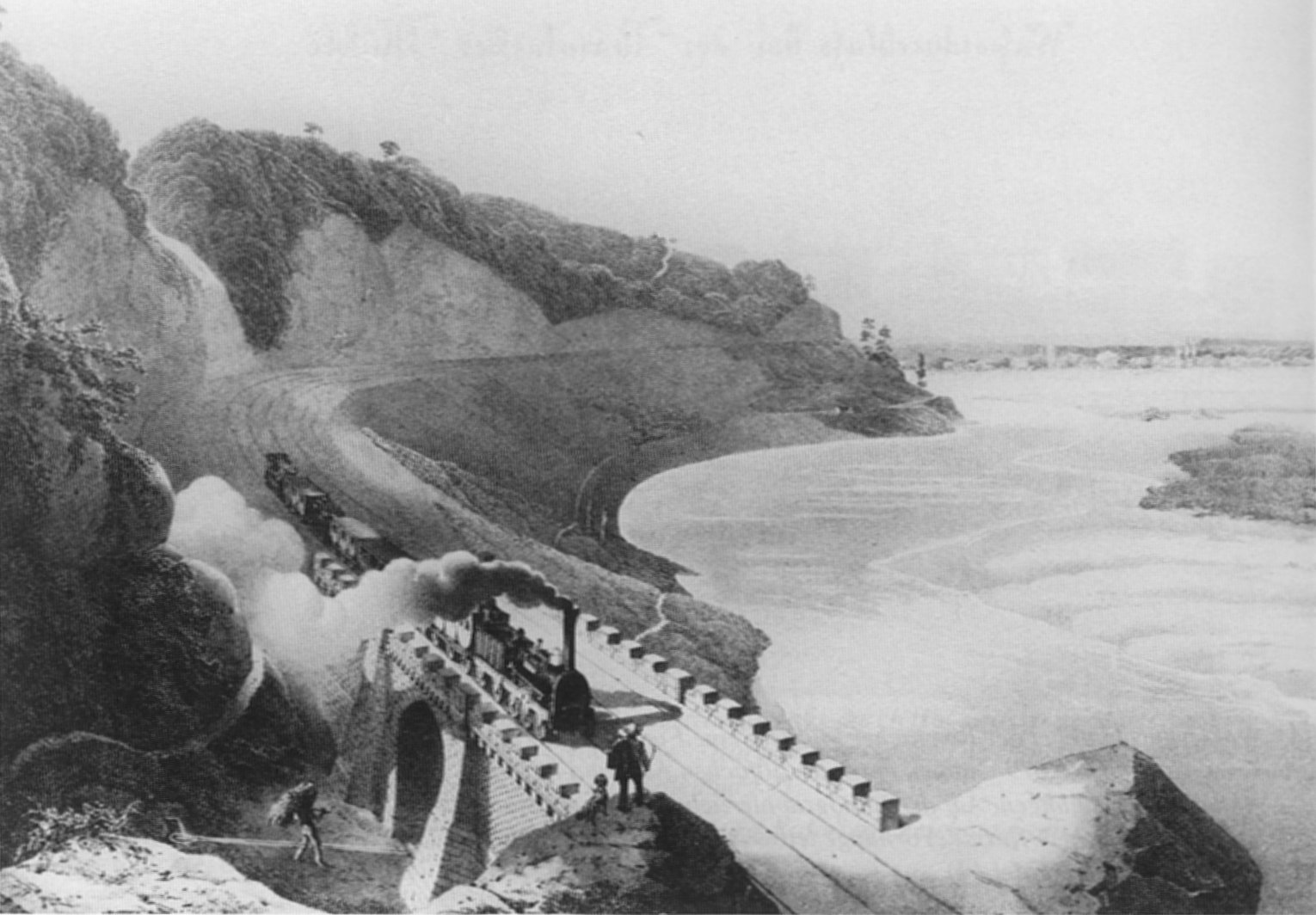 Zug in der Nähe des "Isteiner Klotz" (bei der Felsenmühlebrücke) zwischen Freiburg (Breisgau) und Basel, Lithographie